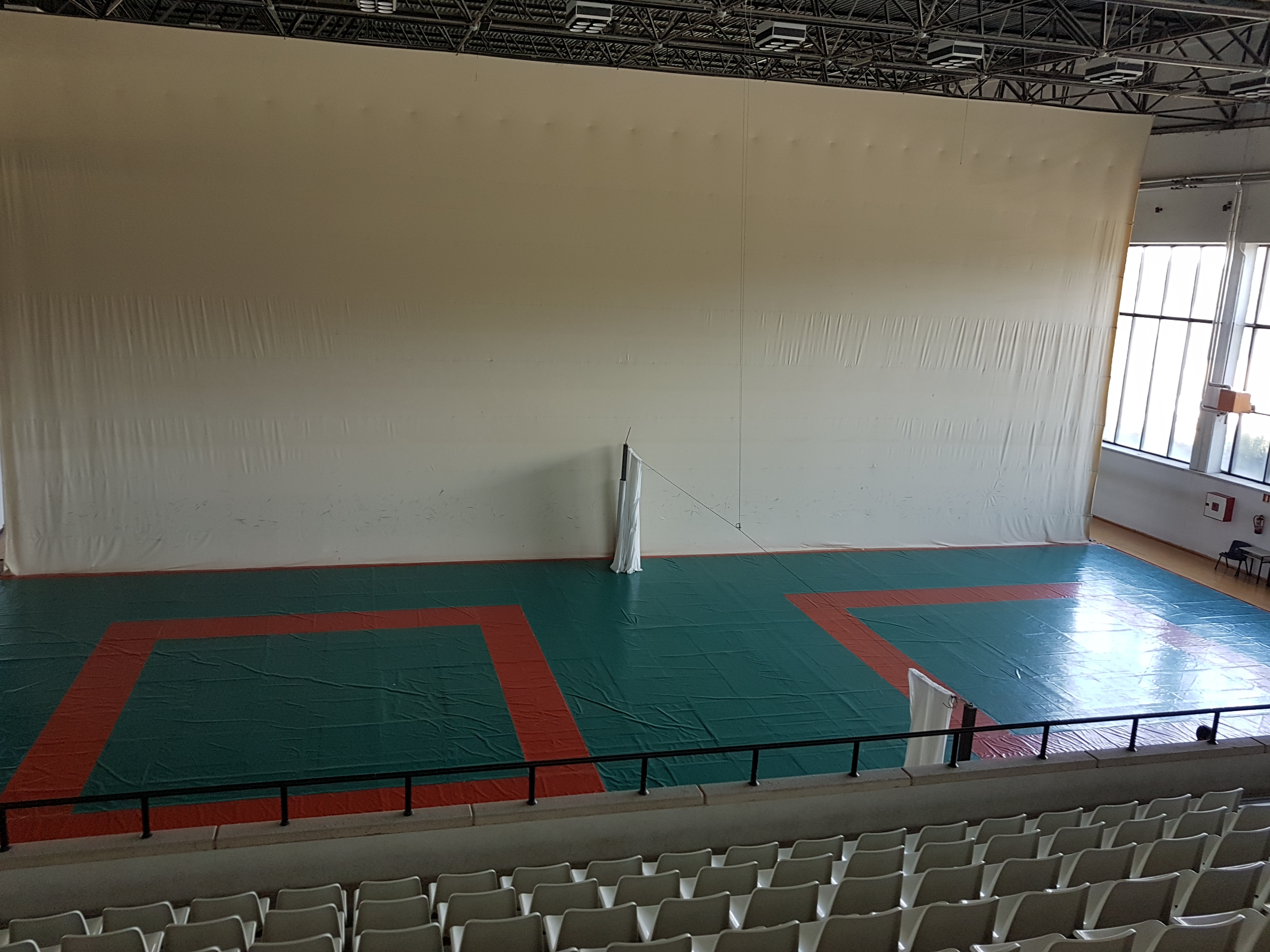 Vista interior PAbellon ENP